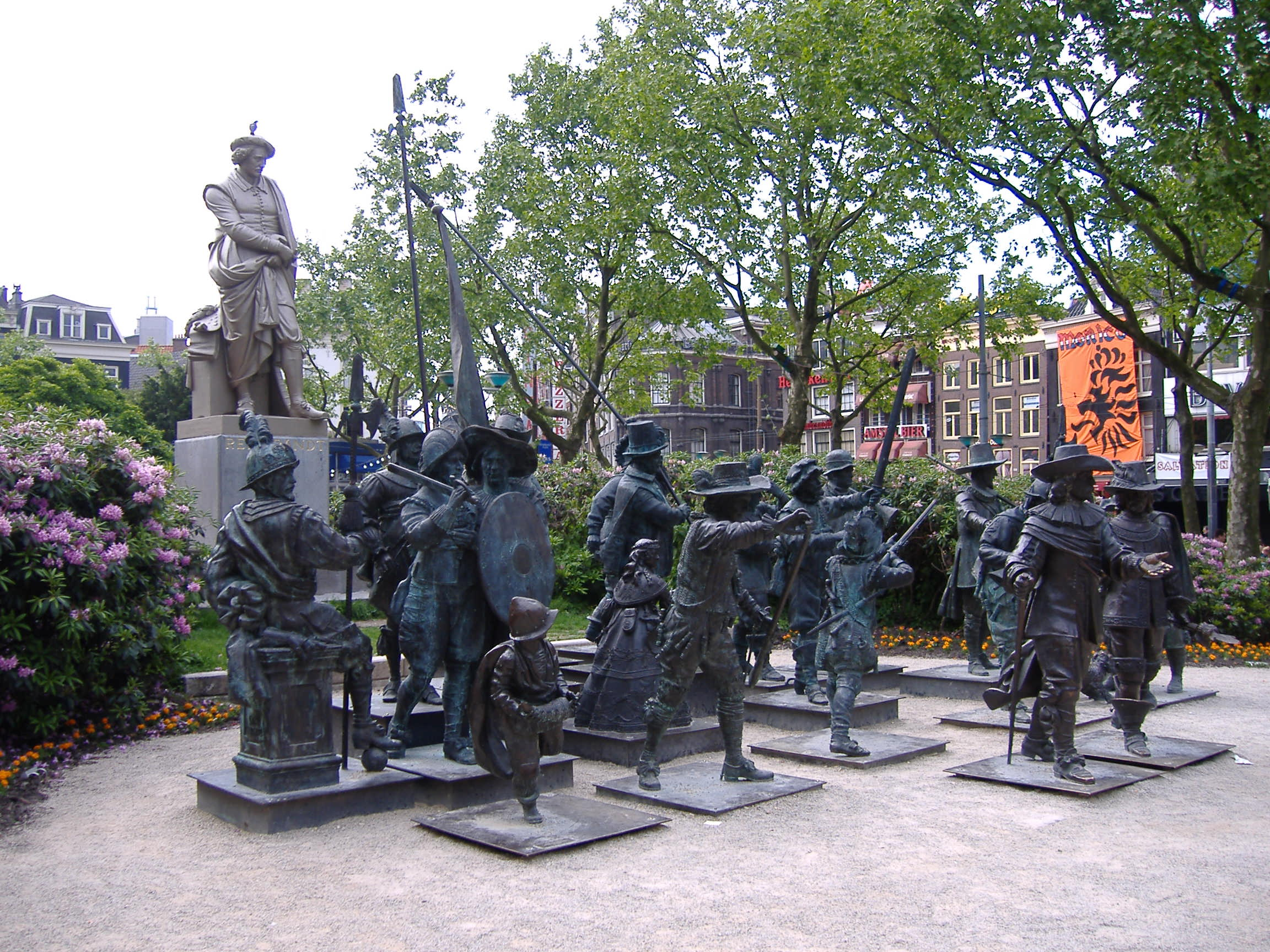 Rembrandtplein, Amsterdam. Eigen opname 3 juni 2006. Sculptors: Alexander Taratynov (*1956 [1]) with Mikhail Dronov (*1956 [2]). [3] See also De_Nachtwacht#Trivia.